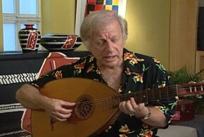 Músico brasileiro Juca Chaves em imagem do acervo da TV Brasil.